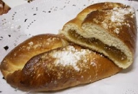 Farinosa